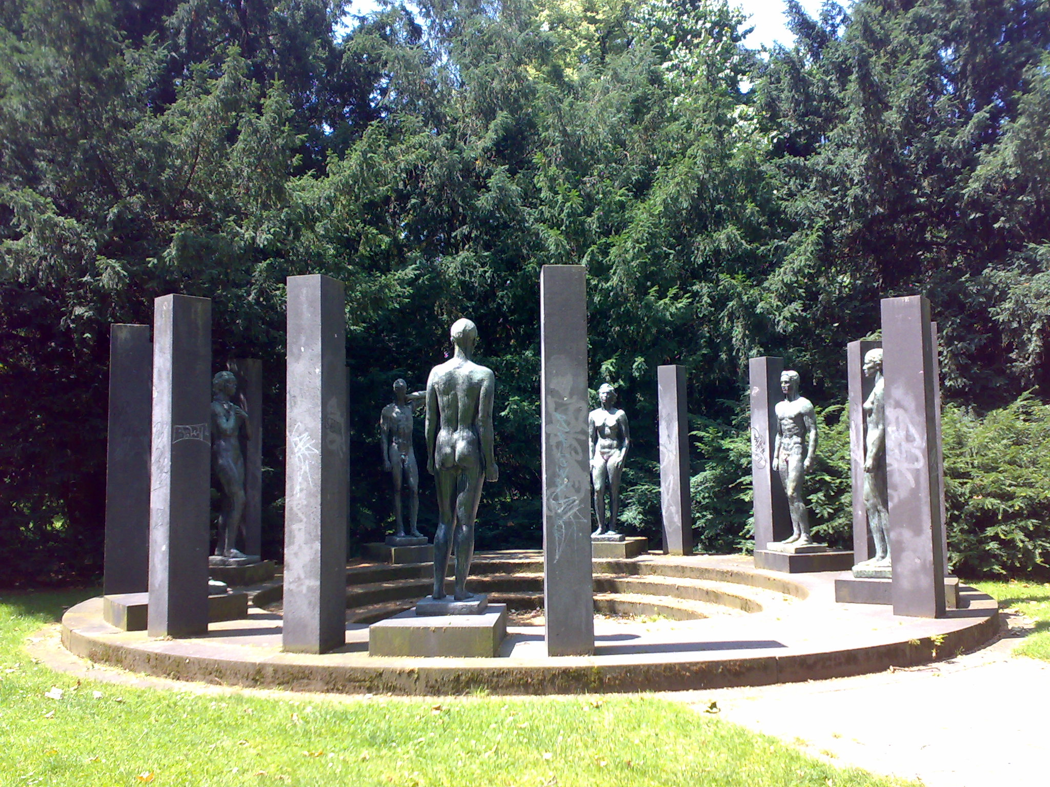 Statuengruppe von Georg Kolbe im Rothschildpark in Frankfurt aus 1954: "Ring der Statuen". Sieben überlebensgroße, nackte Bronzefiguren bilden einen Ring, sie werden von jeweils zwei dunklen Basaltstelen flankiert.